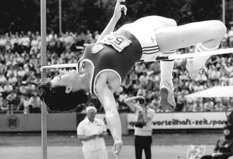 Andrea Bienias ADN-ZB Ludwig-3.6.84 Erfurt: 35. DDR-Meisterschaften in der Leichtathletik. DDR Meister. Beim Hochsprung der Frauen wurde Andrea Bienias vom Sportklub DVfK Leipzig mit 1,90 m DDR-Meisterin.